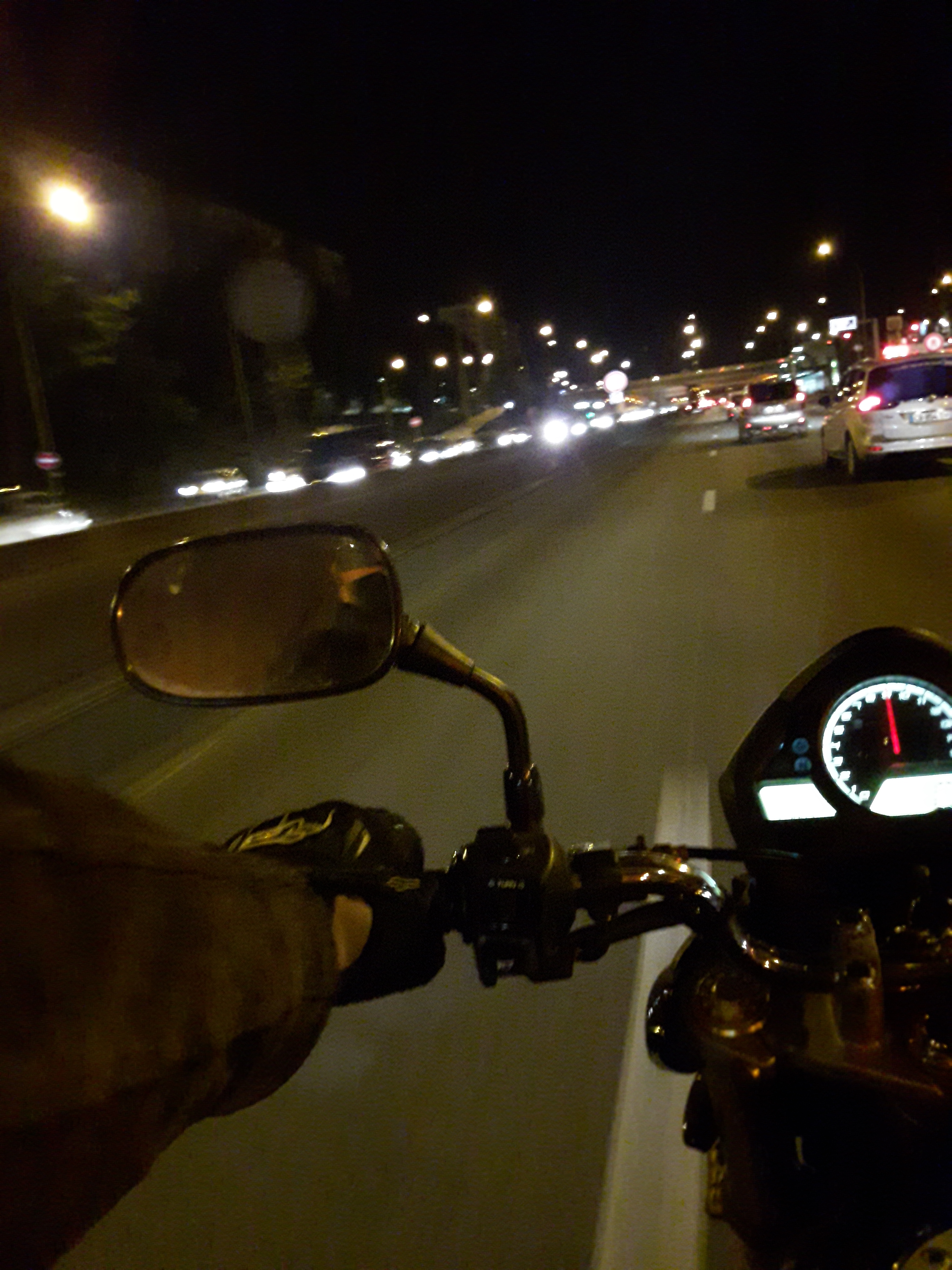 Conduite à moto sur le périphérique de Paris